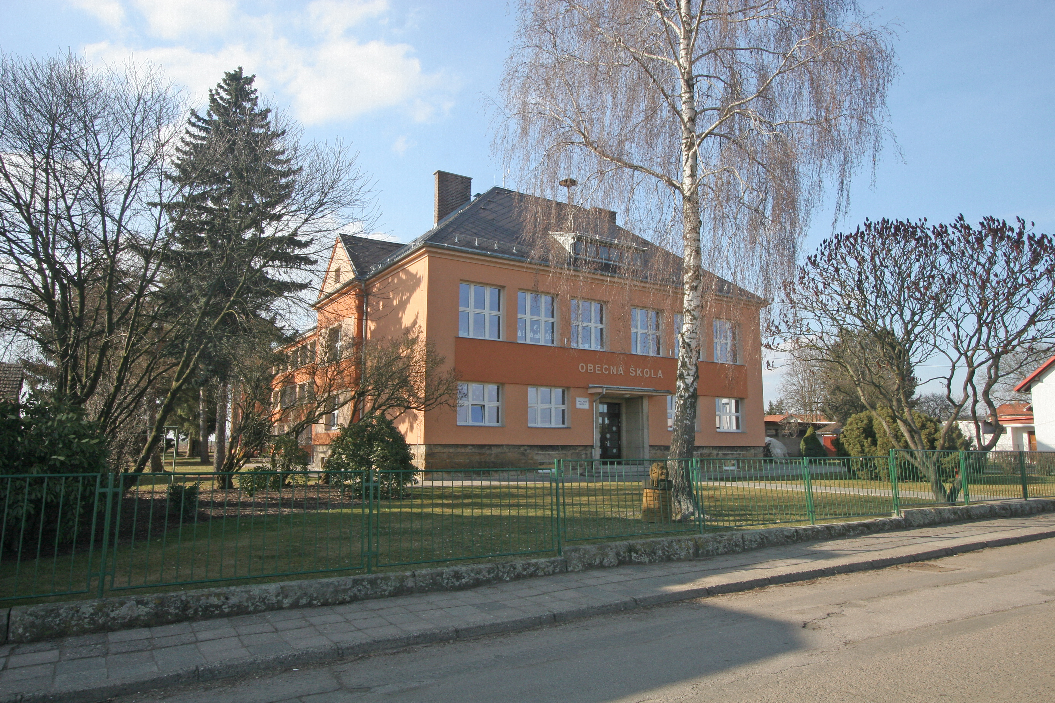 Dobrá voda u Hořic škola